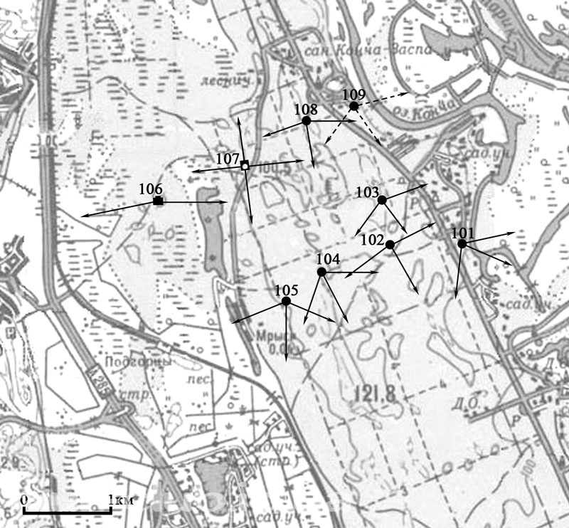 Схема БРО 14 Київського укріпленого району, викладена у вільний доступ авторами книги "Киевский укрепленный район 1928—1941" (